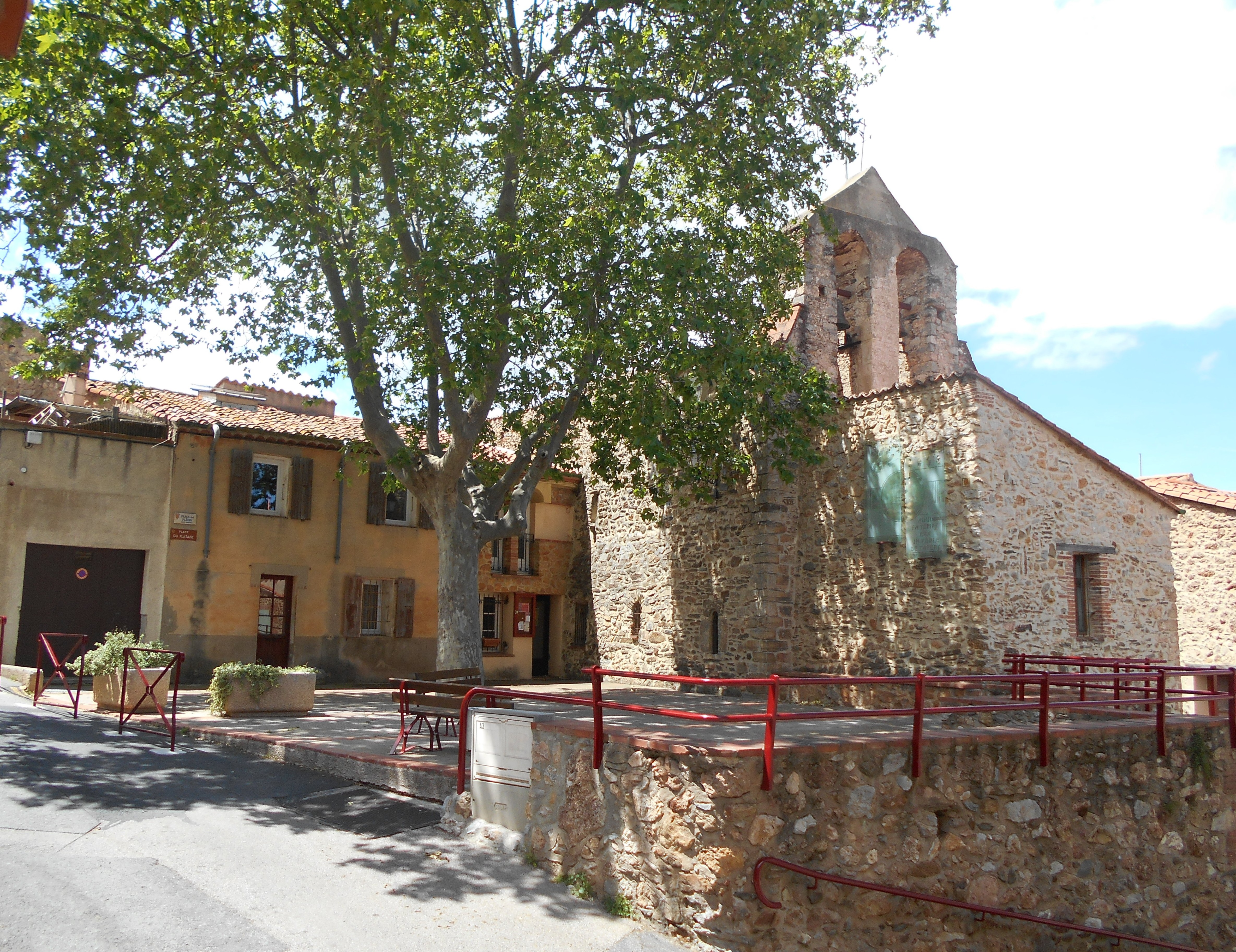 Sant Martí de Llauró